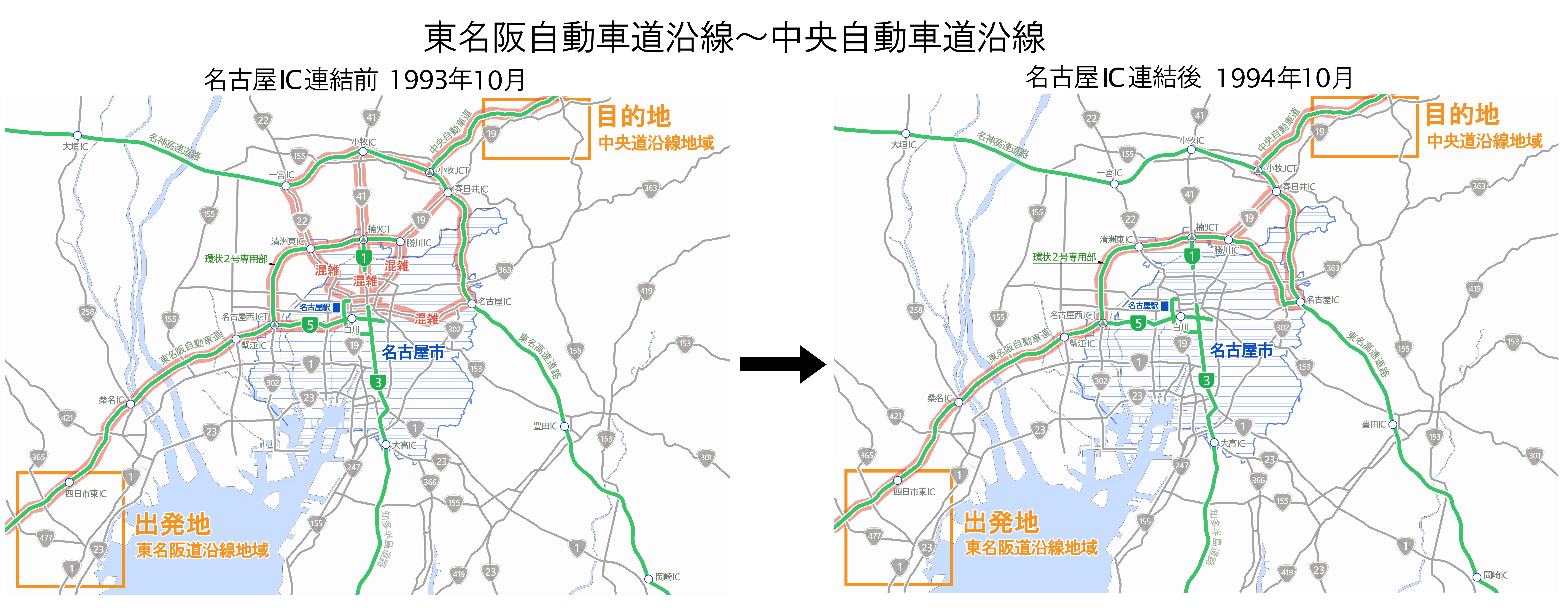 名古屋環状2号線専用部、名古屋IC-勝川IC間開通前後の影響分析。東名阪沿線と中央道沿線の交通流動。図中の都市高速のナンバリングは便宜的に1995年9月以降の基準で表示した。図典拠：『高速道路と自動車』第38巻第11号、1995年11月、31-36頁